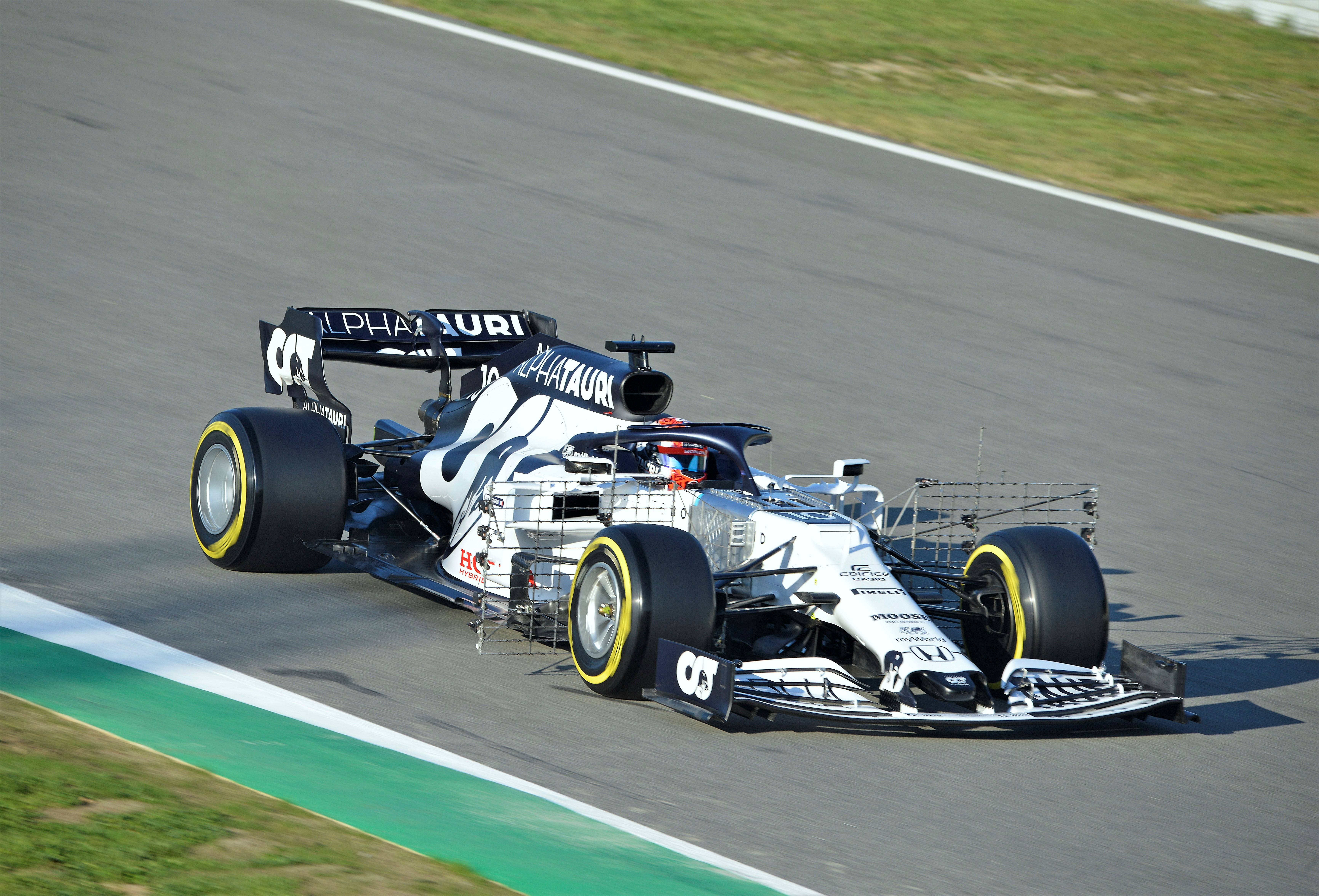 Test Days F1 2020